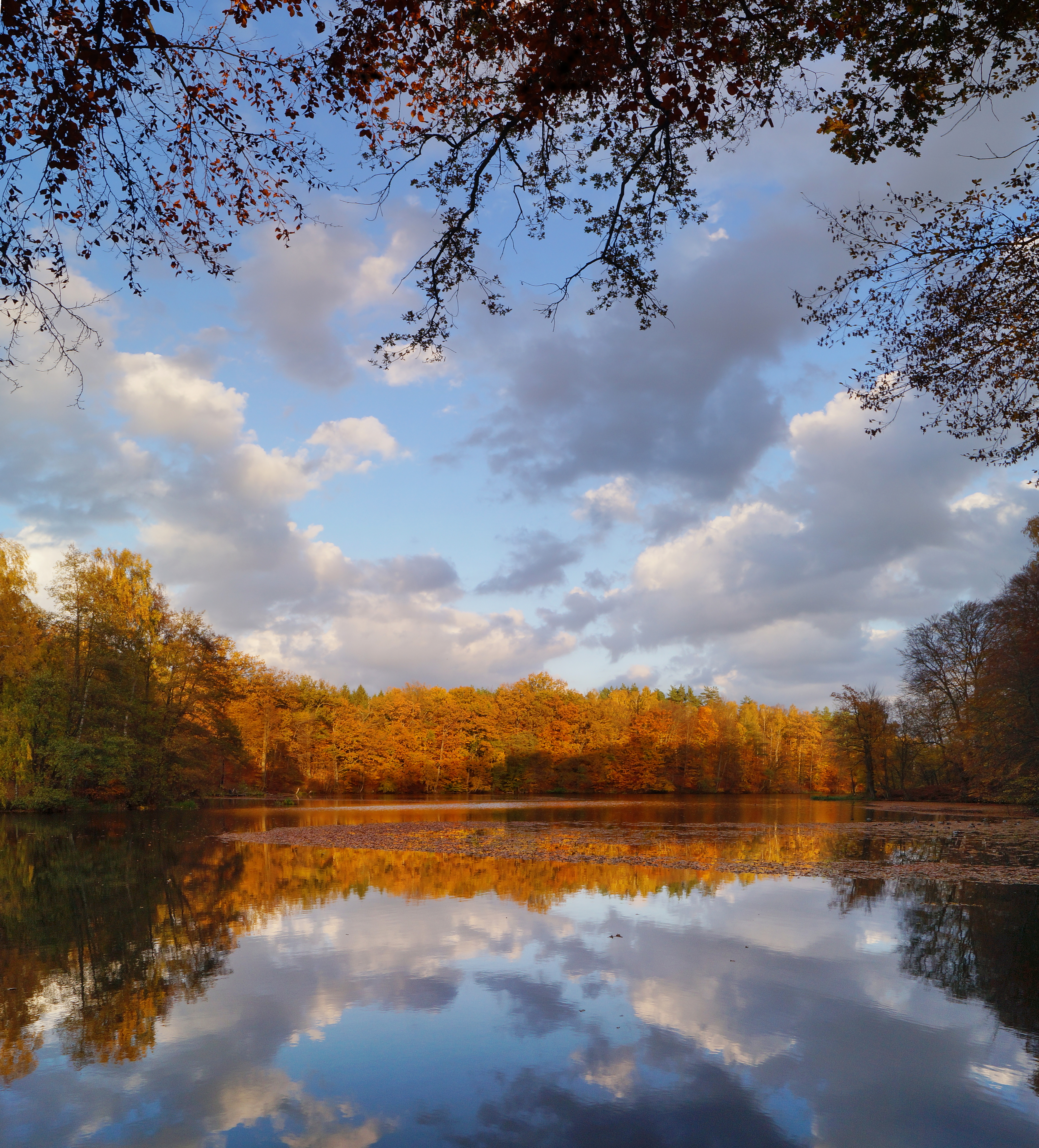 Specjalny obszar ochrony siedlisk: Dorzecze Regi This is a photography of protected area with CRFOP ID PL.ZIPOP.1393.N2K.PLH320049.H